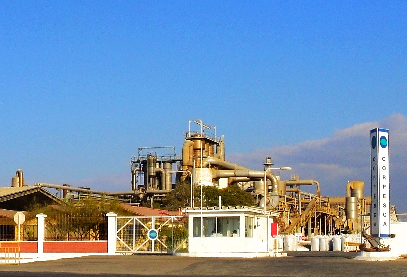 Planta Corpesca Mejillones Corpesca Mejillones: actualmente la única planta de este tipo en funcionamiento en la ciudad, luego del desmantelamiento de las otras dos instalaciones de procesamiento de aceite y harina de pescado como fueron Pesquera Guanaye y Loa.